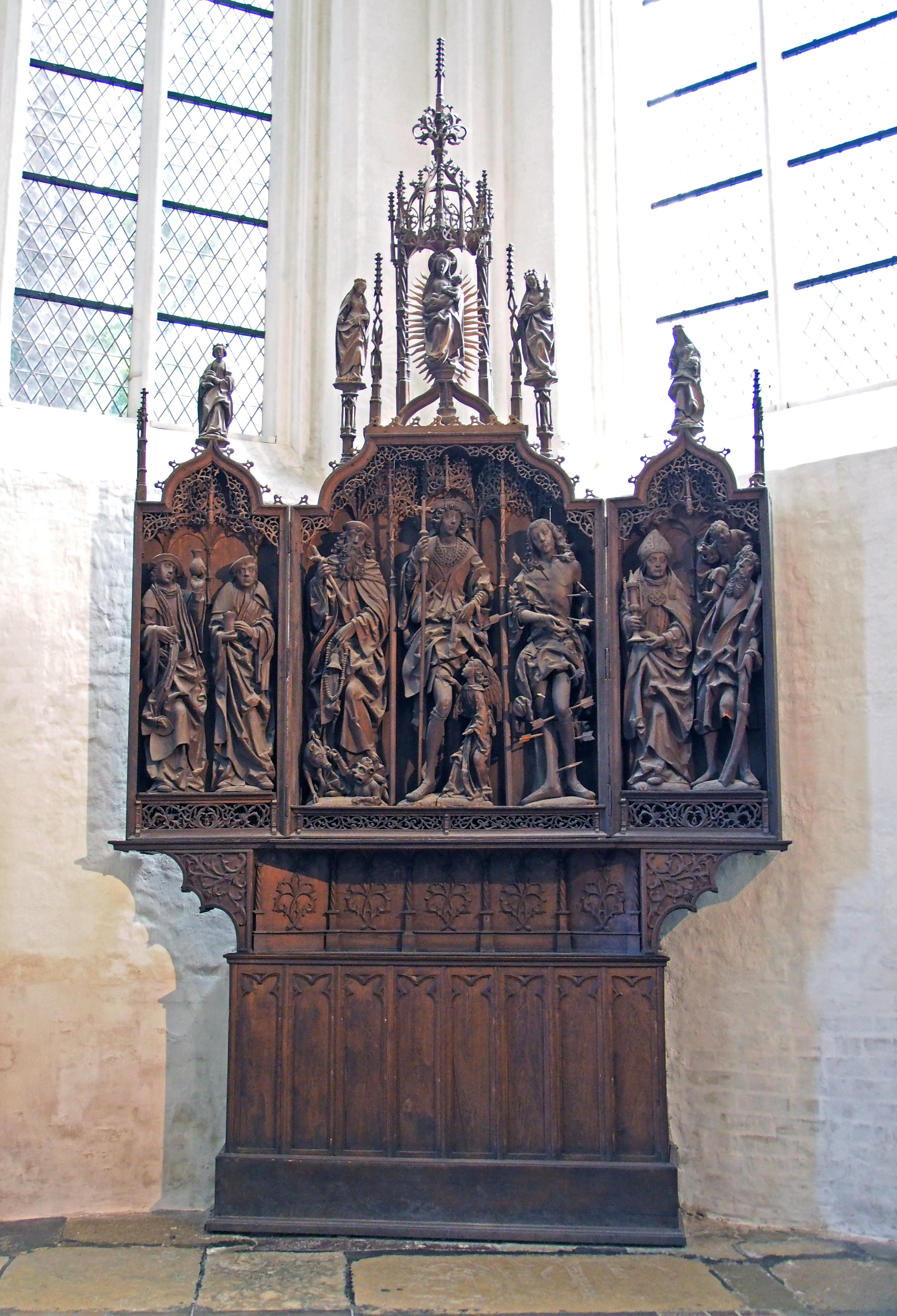 Rochusaltar (um 1550), Innungsaltar der Wundärzte und Bartscherer in der St. Marien Kirche (Rostock)